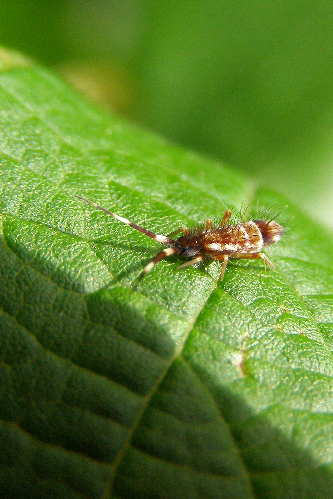 Springschwanz Collembola. Orchesella flavescens.